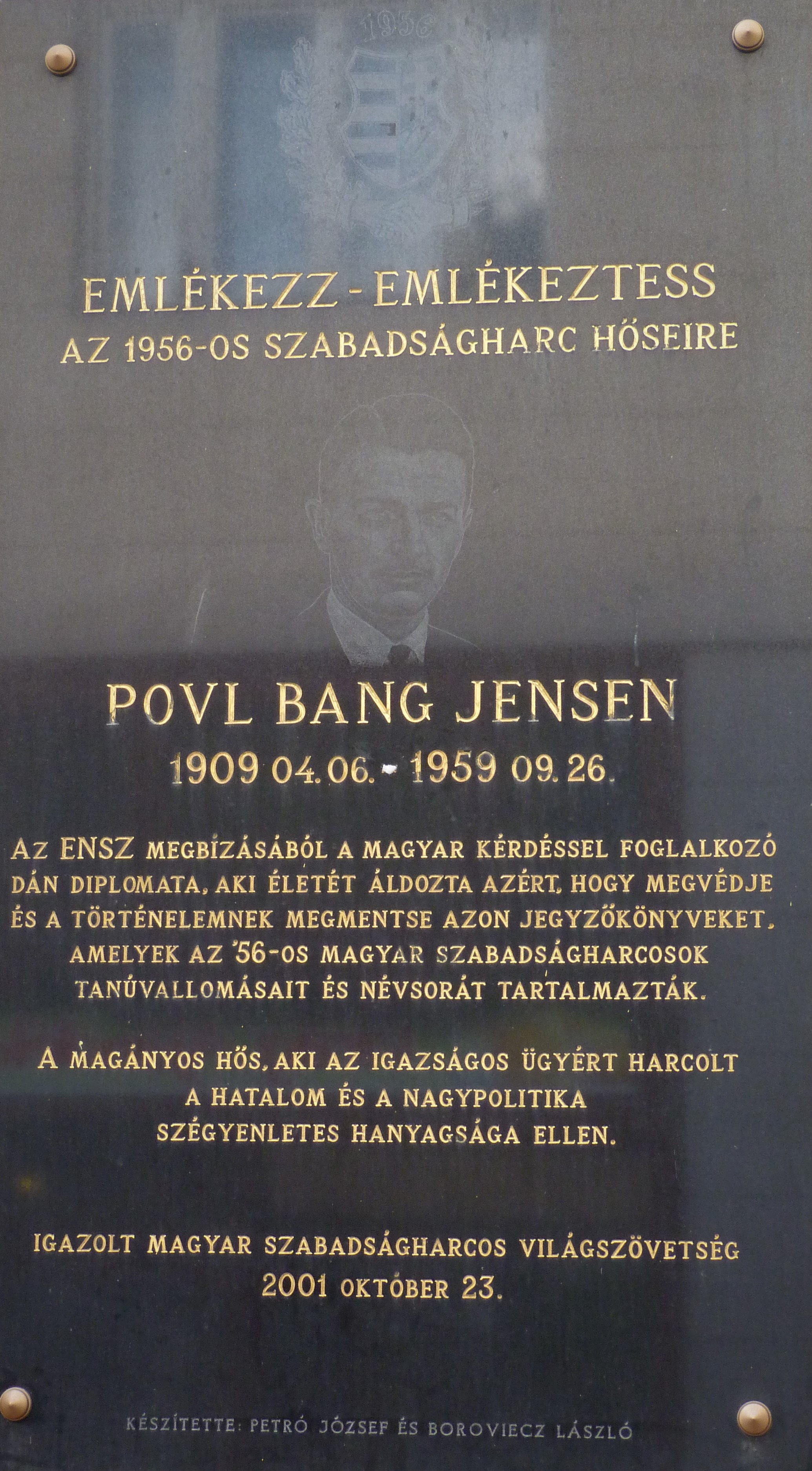 A felvétel 2012. december 5 -én készült Budapesten, a Józsefvárosban. Corvin köz. ©© Published under Creative Commons in the Metapolisz DVD line. All of the photos and vids in the Metapolisz DVD line are under Creative Commons and can be used even for commercial – for profit – purposes. Recommended Citation Derzsi Elekes Andor: Metapolisz DVD line ©© Megjelent Creative Commons alatt a Metapolisz sorozatban. A Metapolisz sorozat valamennyi képe és filmje Creative Commons alatti valamint kereskedelmi - for profit - célra is felhasználható. Ajánlott hivatkozás: Derzsi Elekes Andor: Metapolisz DVD line . Másik fénykép ugyanerről a tábláról: File:PovlBangJensen Corvin1.jpg